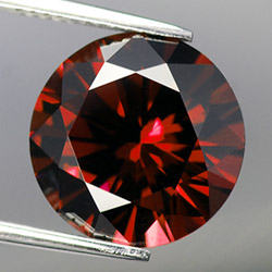 Пироп